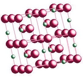 Model kristalne strukture intersticijske trdne raztopine, v kateri se atomi topljenca (zelene kroglice) vrinejo v prostore med atomi topila (rdeče kroglice).